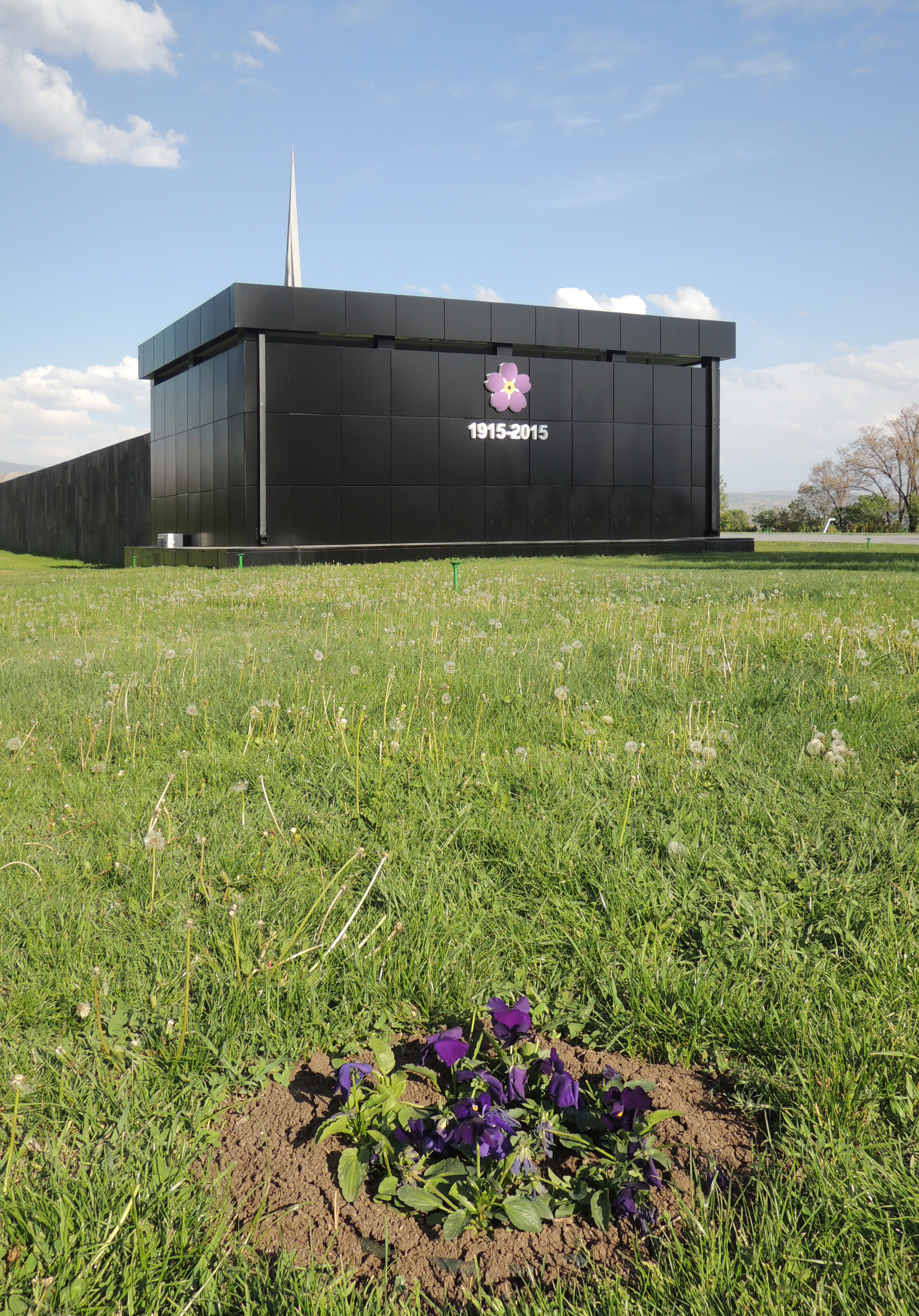 Armenia